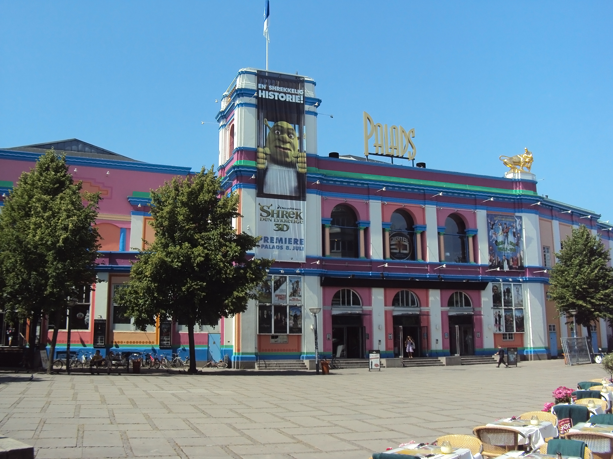 Palads cinema in Copenhagen